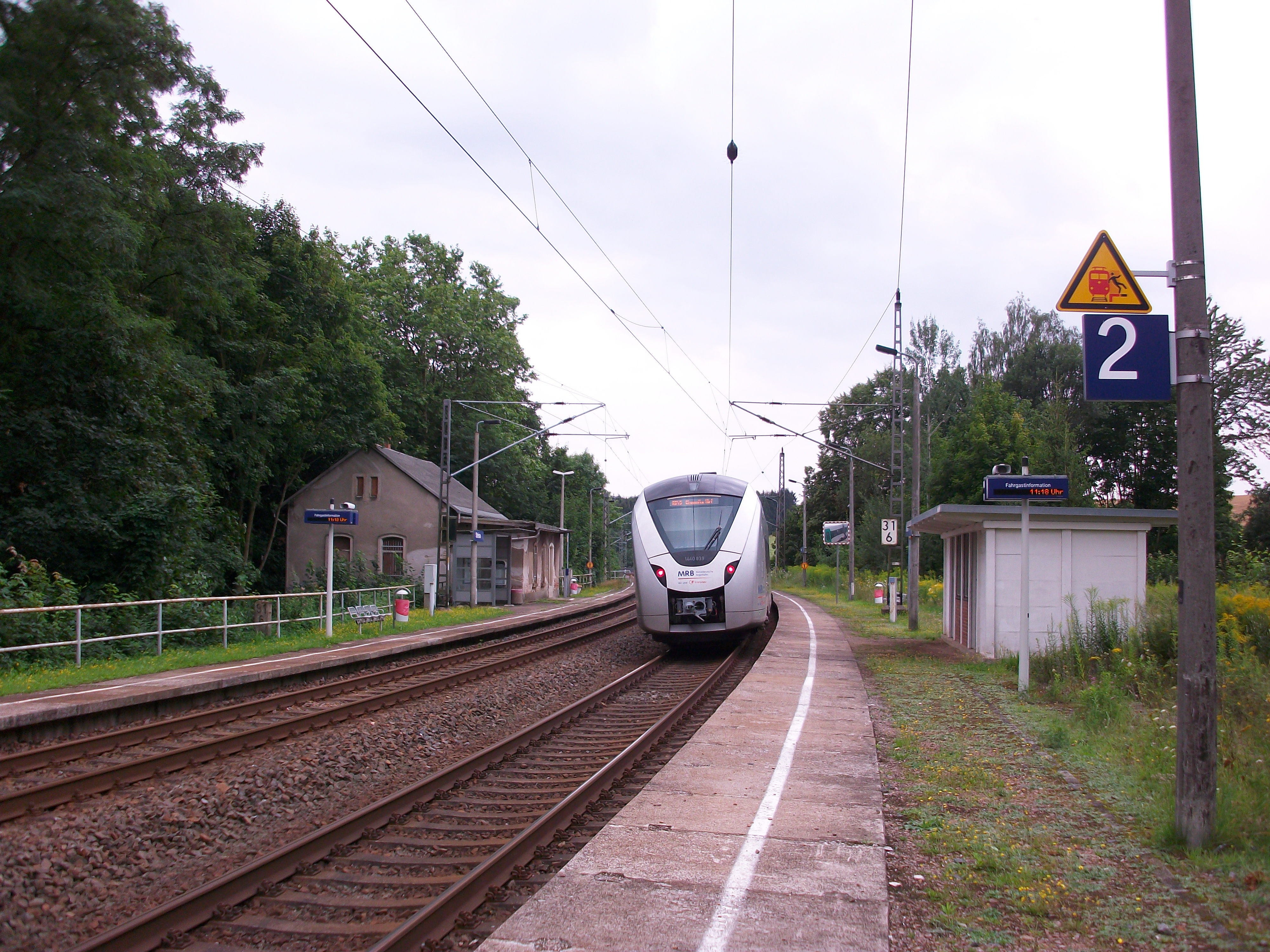 Haltepunkt Steina mit Regionalbahn der Mitteldeutschen Regiobahn (2017)